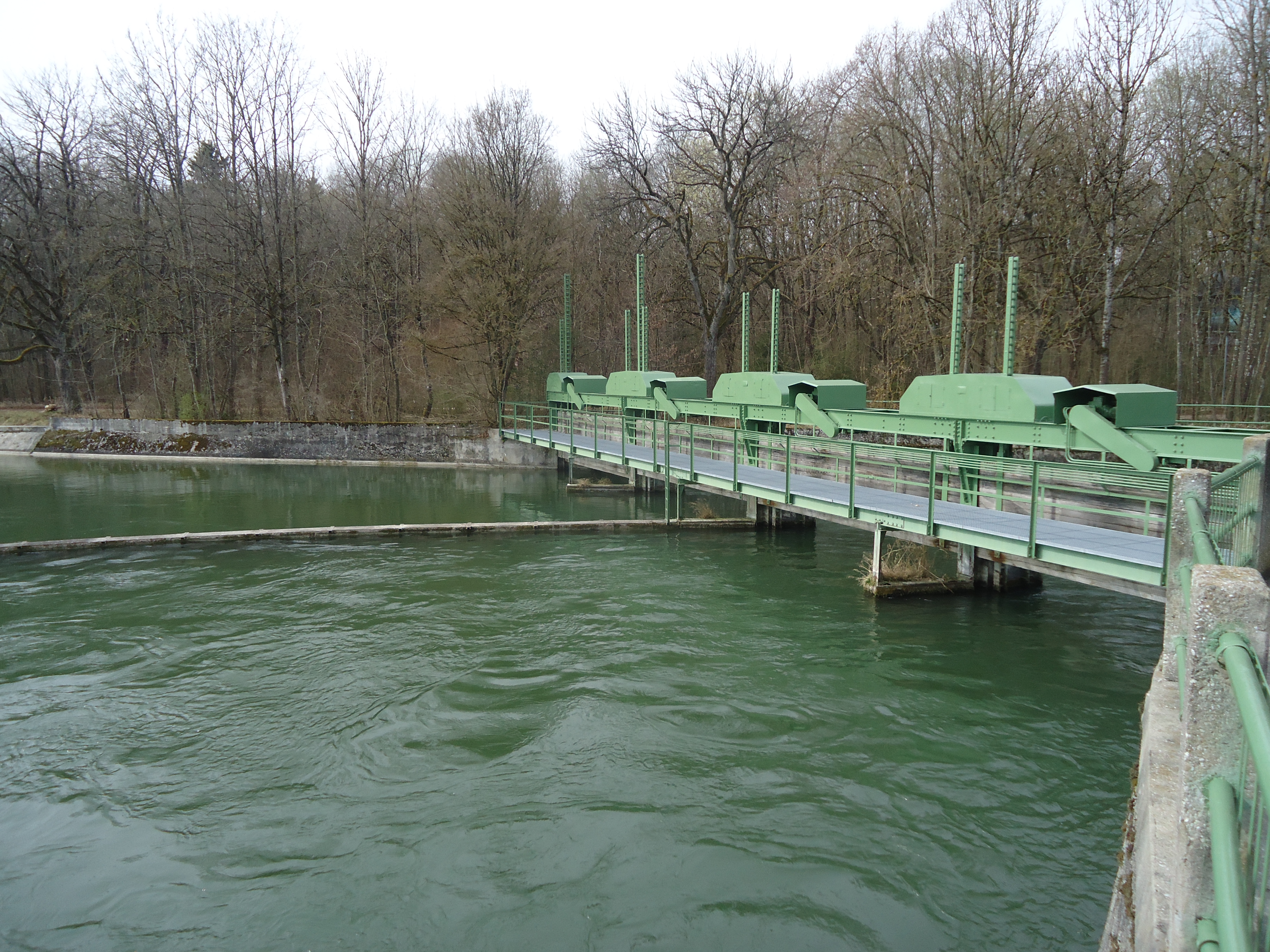 Hochablass Hauptstadtbach Ableitung Lech.